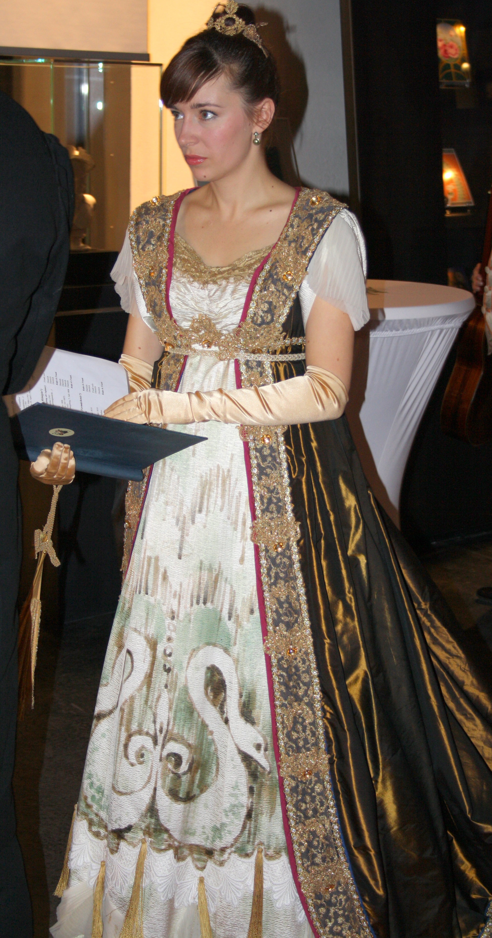 Die lettische Sopranistin Katrina Krumpane als Königin Luise im Programm „Aber mein Herz ist jung“ bei den Höfischen Festspielen Potsdam.